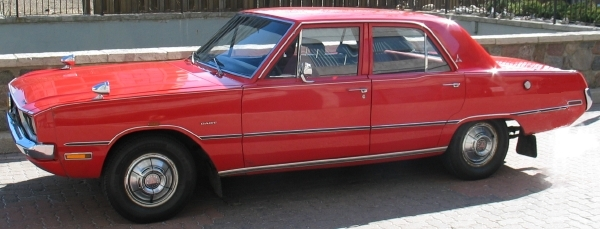 1971 Dodge Dart 4-door sedan with aftermarket fender mirrors